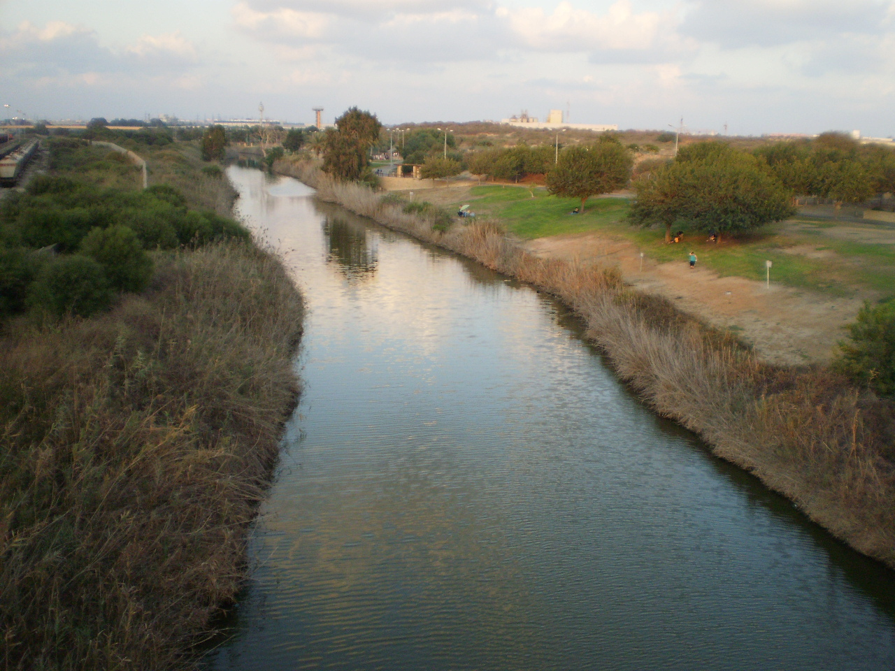 צילום של פארק לכיש ממעלה הכביש